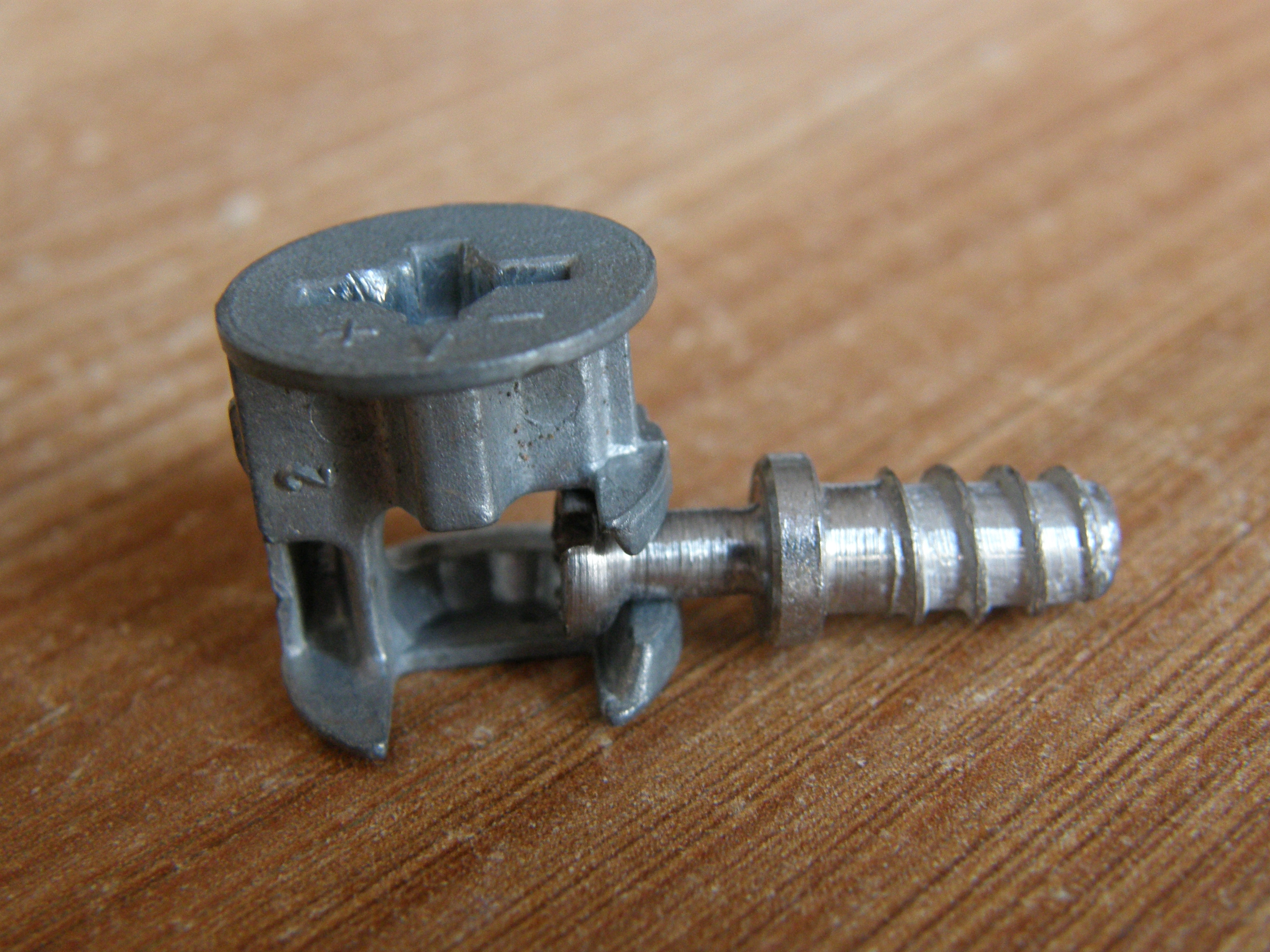 Photo d'un excentrique couplé à un goujon